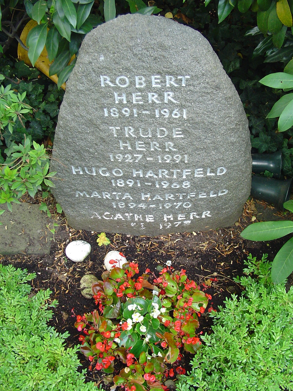 Grabstein von Trude Herr auf dem Kölner Nordfriedhof